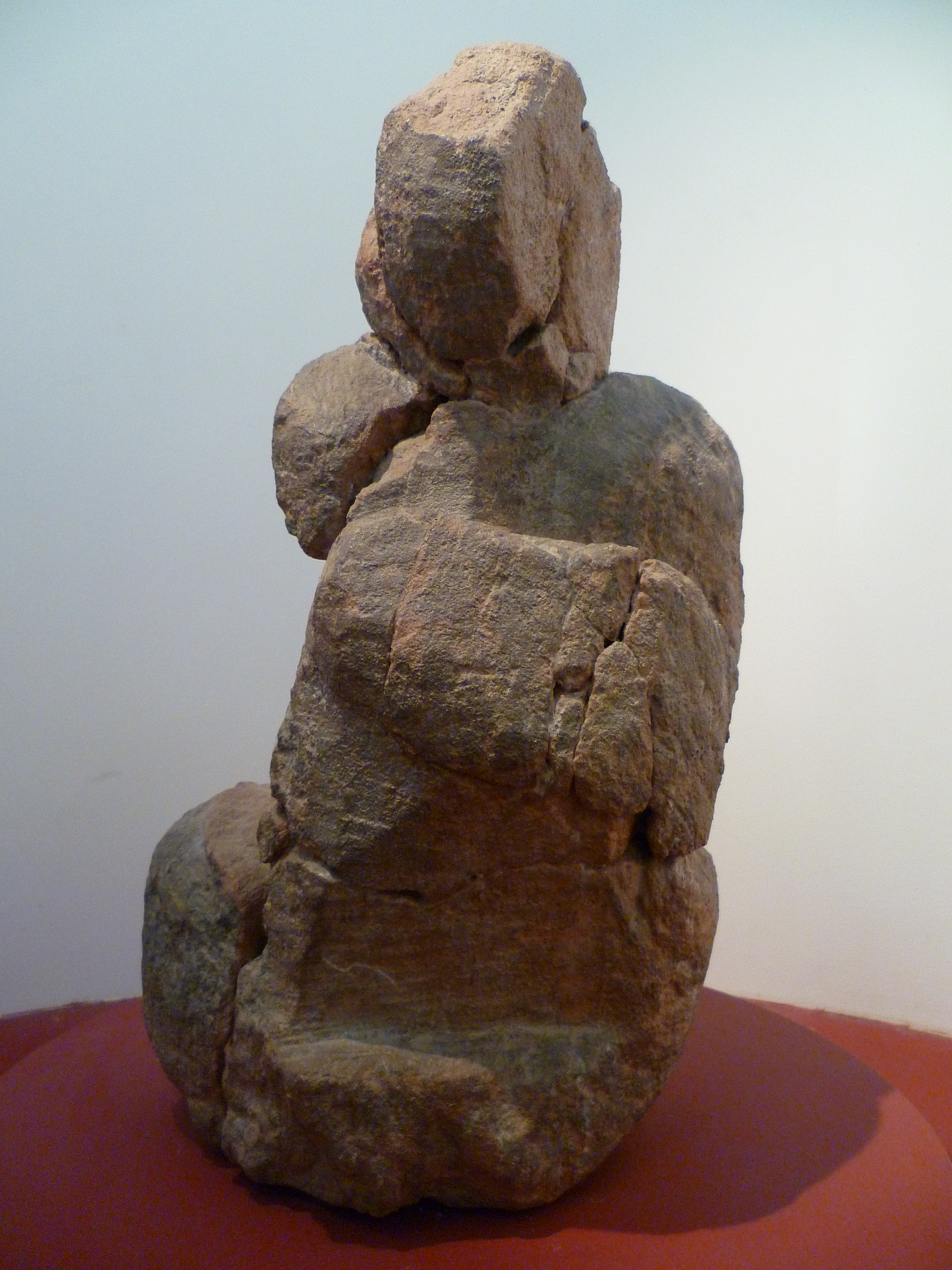 Statue anthropomorphe au Musée Saint-Raymond de Toulouse, excavée d'un autel. Date de la sculpture : 44 - 25 av. J.-C. Origine : Vieille-Toulouse. Numéro d'inventaire : Inv. D.98.4.1.